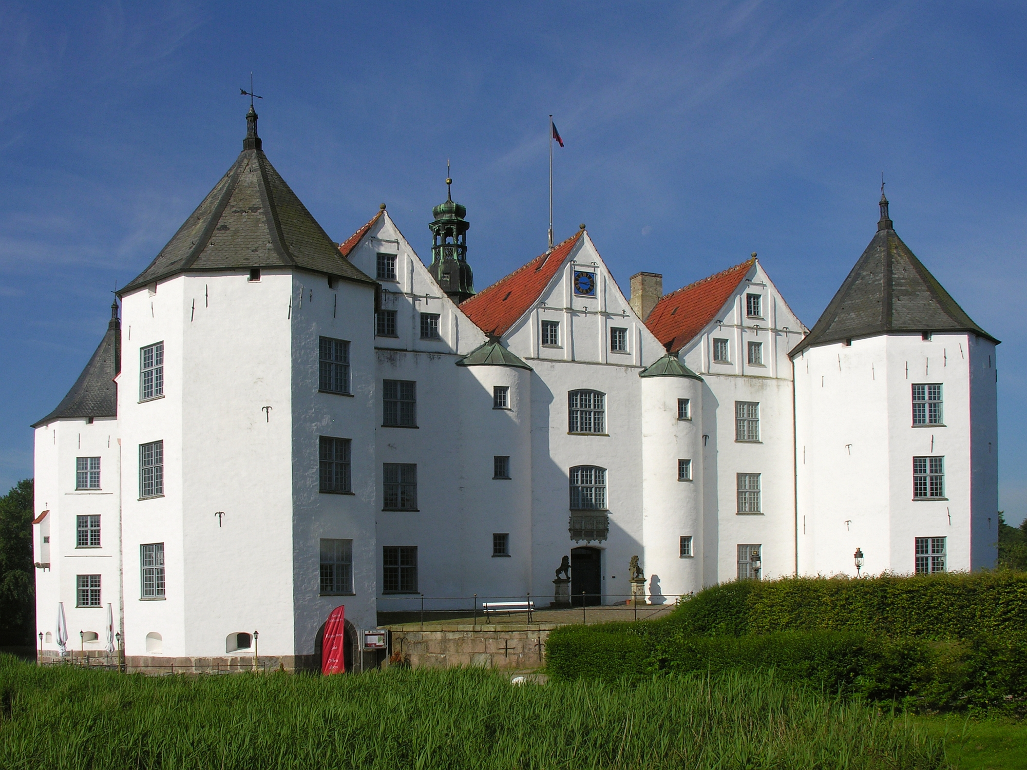 Kulturdenkmal Schloss Glücksburg 4.1h Wasserschloss Ansicht von Norden - Schleswig-Holstein - Foto 2012 Wolfgang Pehlemann Steinberg/Ostsee DSCN0258